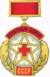 Знак, почетный донор СССР